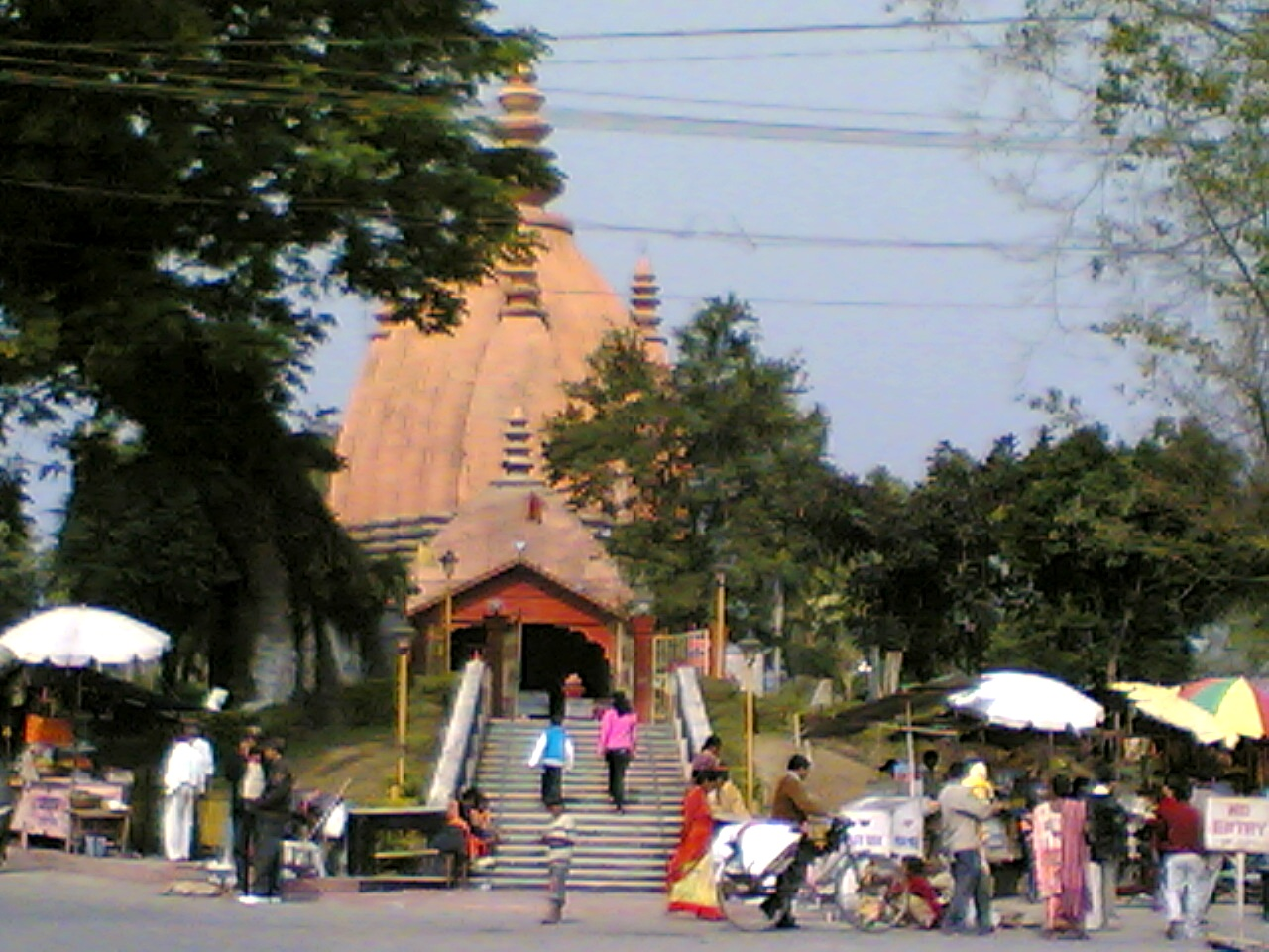 অসমীয়া: স্বৰ্গদেউ শিৱসিংহই প্রথমা ৰাণী বৰৰজা ফুলেশ্বৰী কুঁৱৰীৰ মৃত্যুৰ পাছত তেওঁৰে বিবাহিতা ভনীয়েক দ্রৌপদীক বিবাহ কৰাই অম্বিকা বা মদাম্বিকা নাম দি বৰৰজা পাতিছিল । এইগৰাকী কুঁৱৰীৰ নিৰ্দেশক্ৰমেই সোণৰ ক'লচীৰে সৈতে শিৱদ'ল আৰু শিৱসাগৰ পুখুৰী খন্দোৱা হৈছিল । এই শিৱদ'ল অসমৰ সকলোবোৰ দ'লতকৈ ওখ দ'ল । শিৱদ'লৰ ক'লচীটোত থকা সোণখিনি এৰুৱাই নিবৰ কাৰণে মানে ক'লচীটোলৈ গুলিয়াইছিল, কিন্তু ক'লচীটো বা সোণখিনি খহাব নোৱাৰিলে । ১৯৫০ চনৰ ভূমিকম্পত ক'লচীটো খহি পৰিছিল যদিও ইয়াক আগৰ স্থানত স্থাপন কৰা হৈছিল । শিৱৰাত্ৰিত এই দ'লৰ কাষতে এখন ডাঙৰ মেলা হয়~।